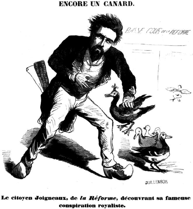 "Encore un canard. Le citoyen Joigneaux, de la Réforme, découvrant sa fameuse conspiration royaliste."